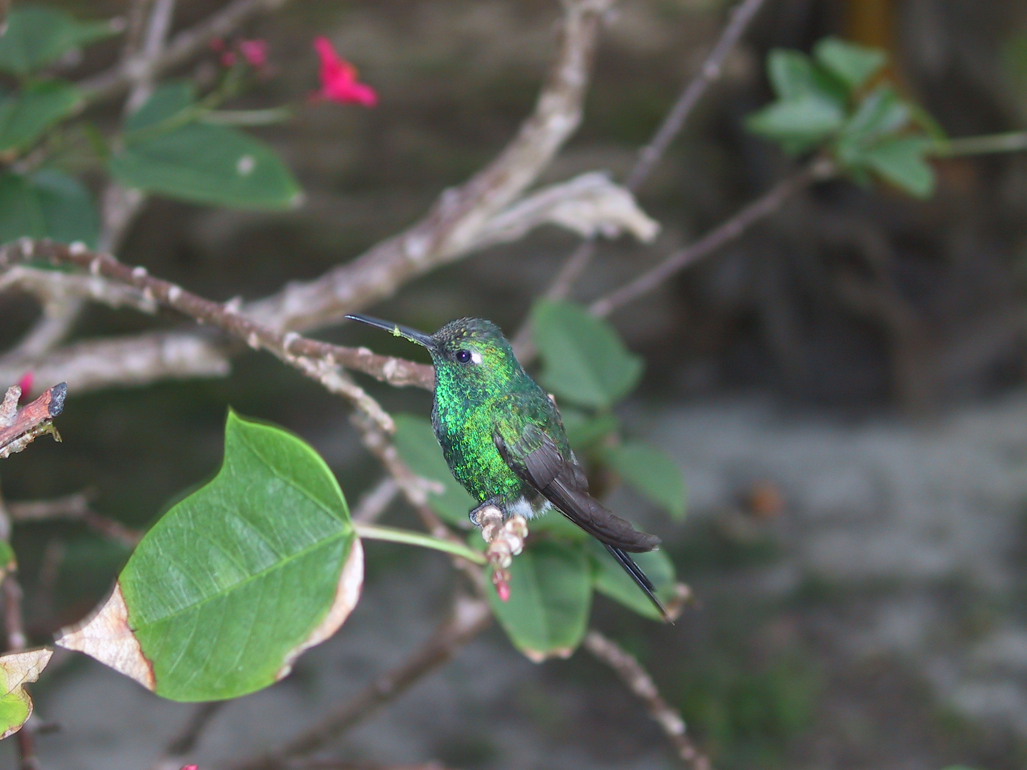 Kubasmaragdkolibri (Chlorostilbon ricordii), Kuba (an der Küste bei Guardalavaca)